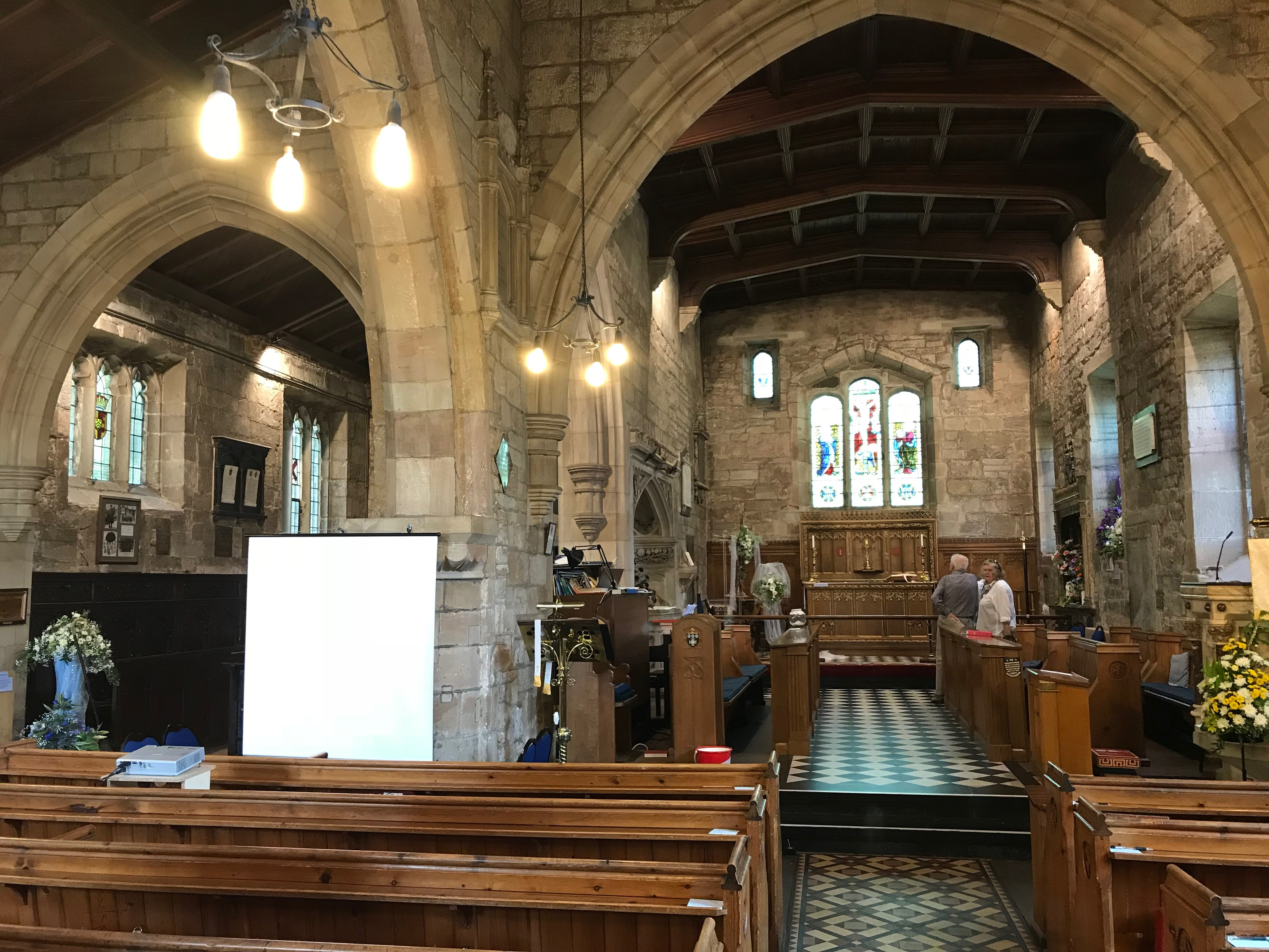 Inside St Helen's Etwall